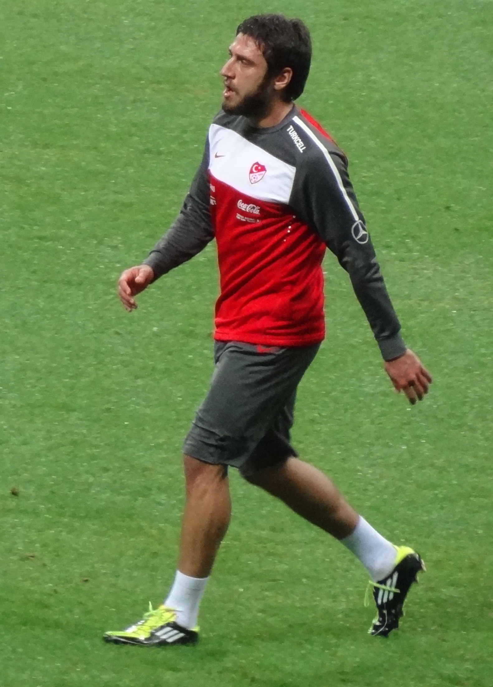 Egemen Hırvatistan maç öncesi